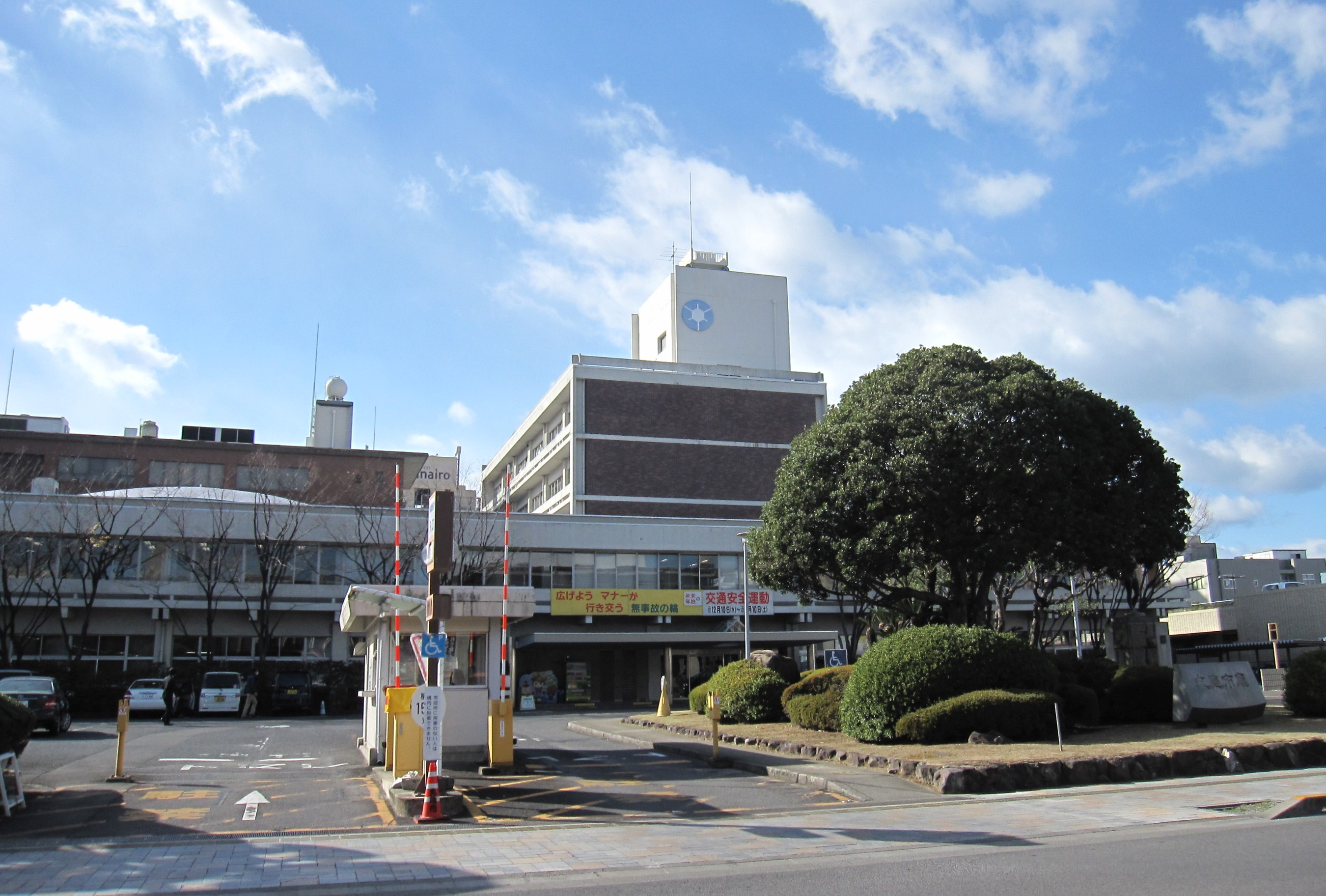 丸亀市役所